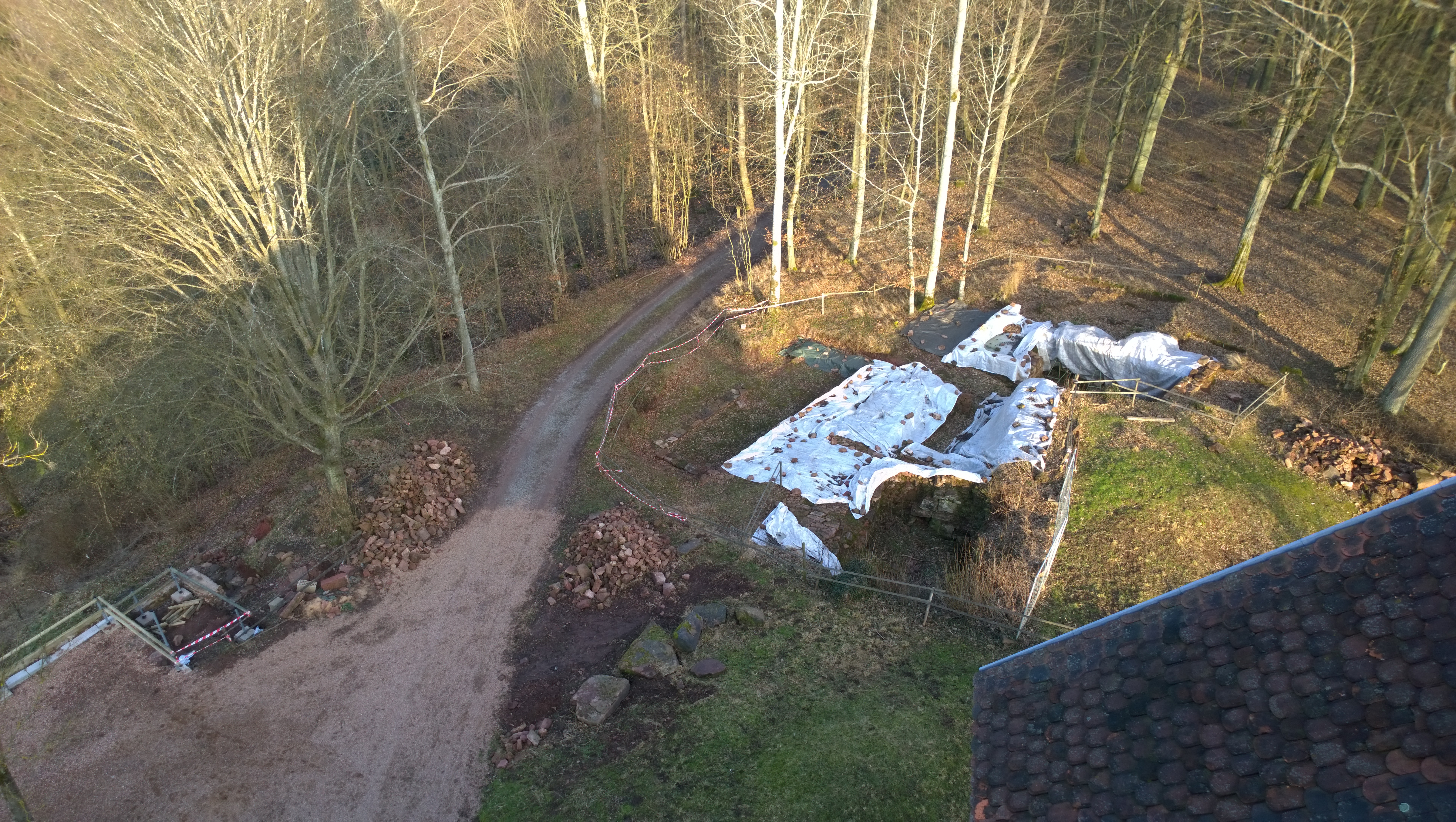 Ausgrabungen auf dem Gotthardsberg zwischen Amorbach und Weilbach (Lkr. Miltenberg, Unterfranken) zur Burg Frankenberg